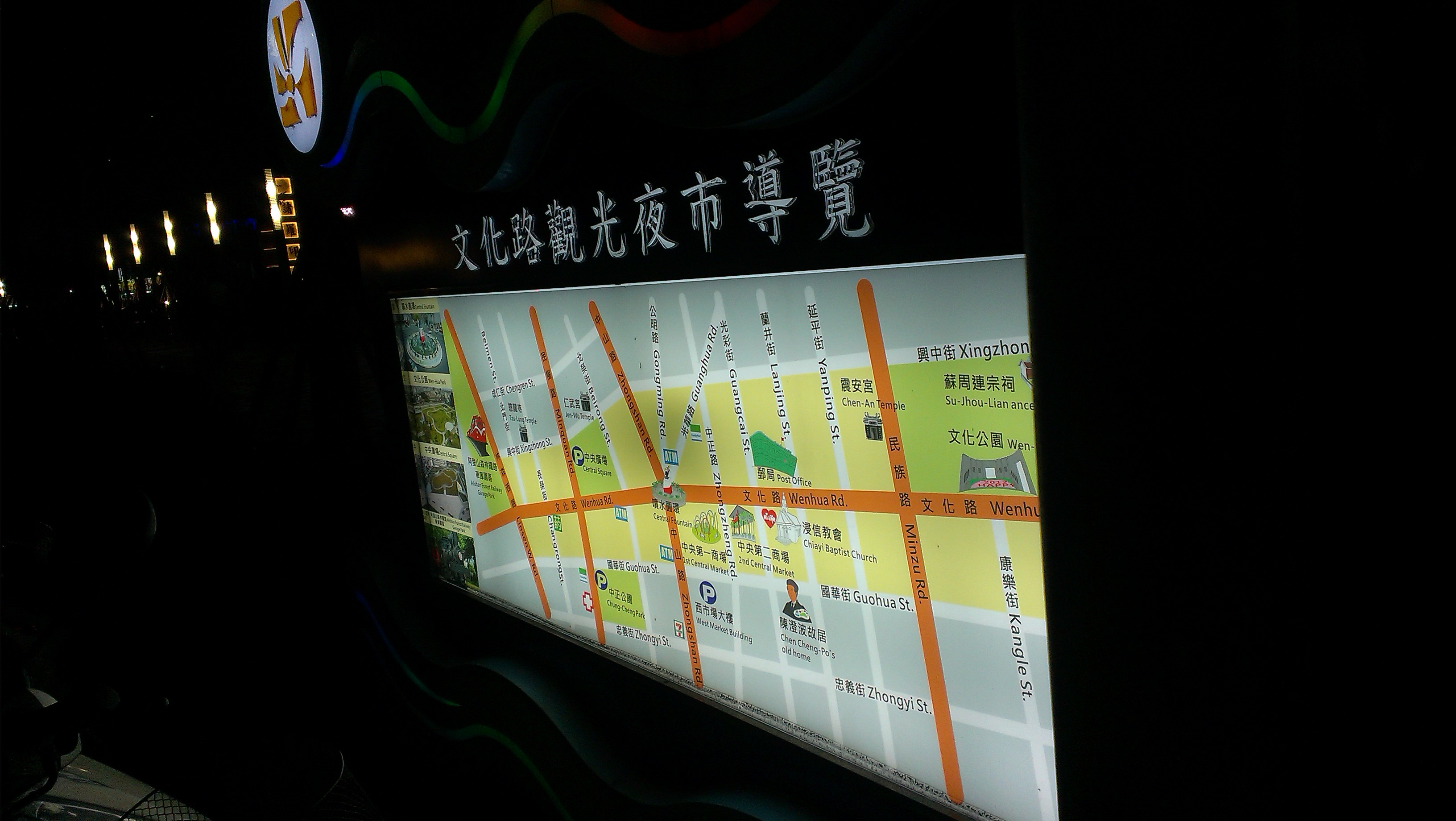 中文（台灣）: 嘉義市文化公園設置的文化路觀光夜市導覽地圖